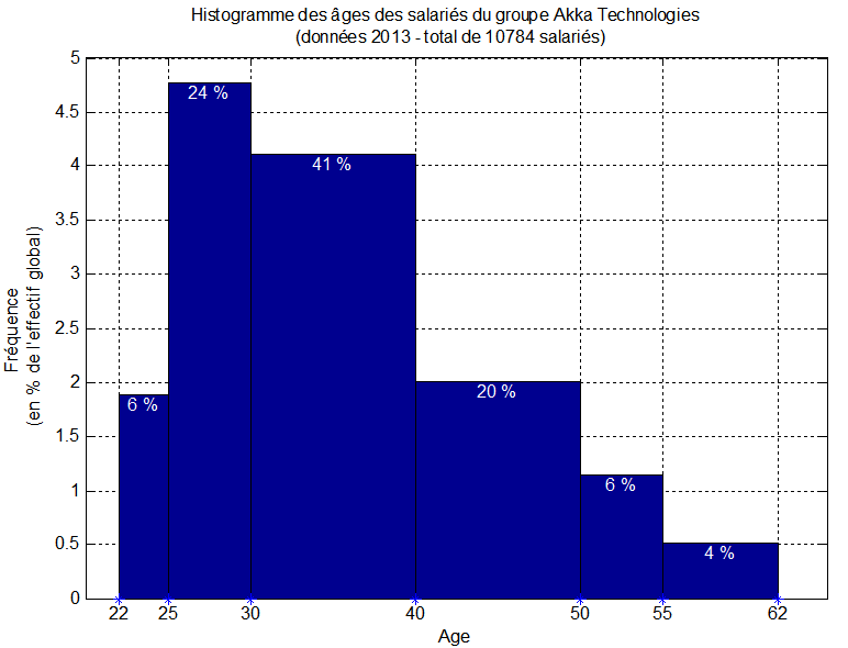 Répartition des effectifs du groupe Akka Technologies par tranches d'âge, en 2013. Données issues du Rapport Annuel 2013 [1].